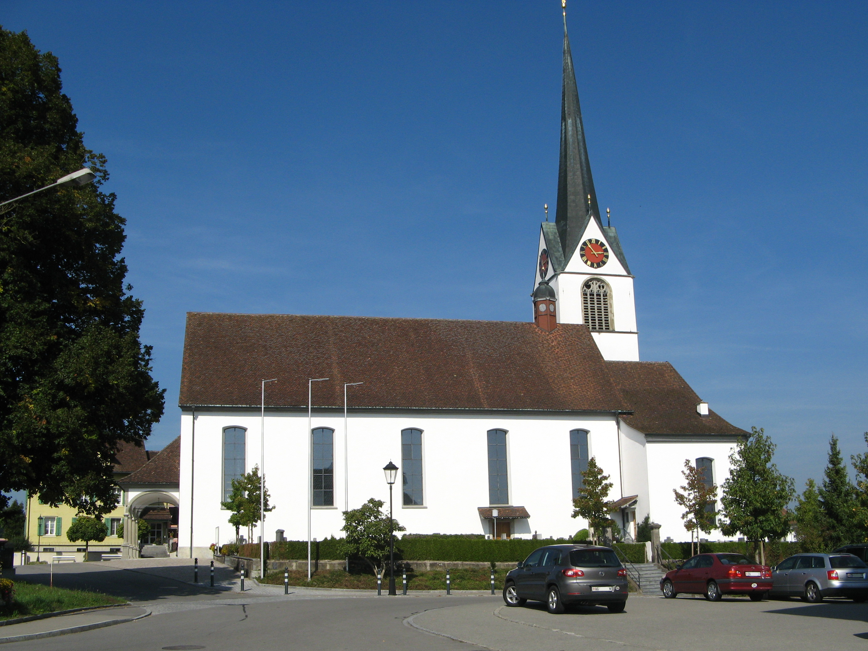 Aussenansicht der Pfarrkirche Mariä Geburt in Sins, von Süden her gesehen